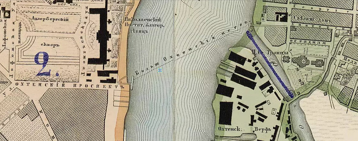 Больше-Охтенский перевоз